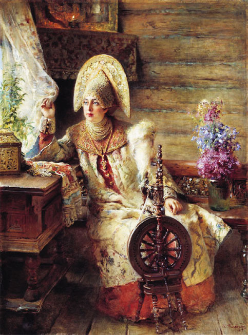 К.Е. Маковский. Боярышня у окна